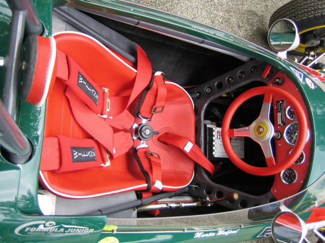 Lotus 22 inside details Pau GP 2007